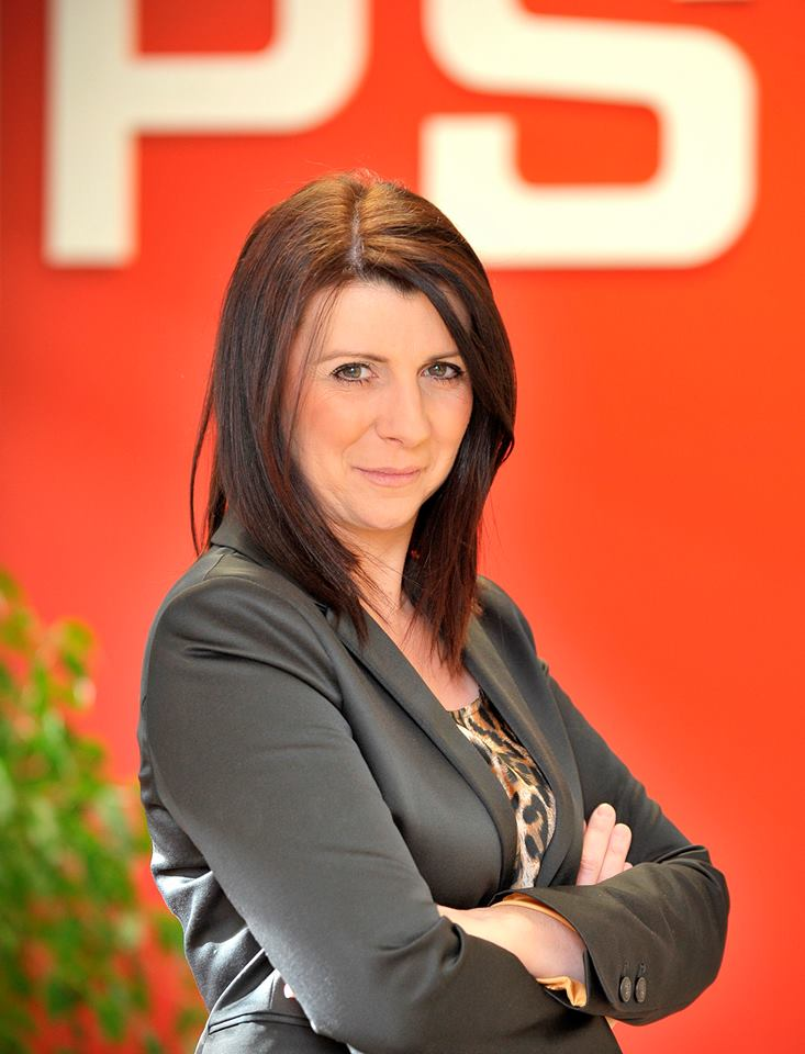 Photo de Muriel Targnion